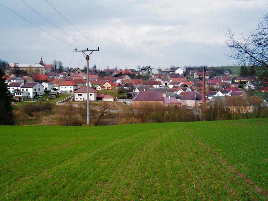 Obec Staré Hobzí